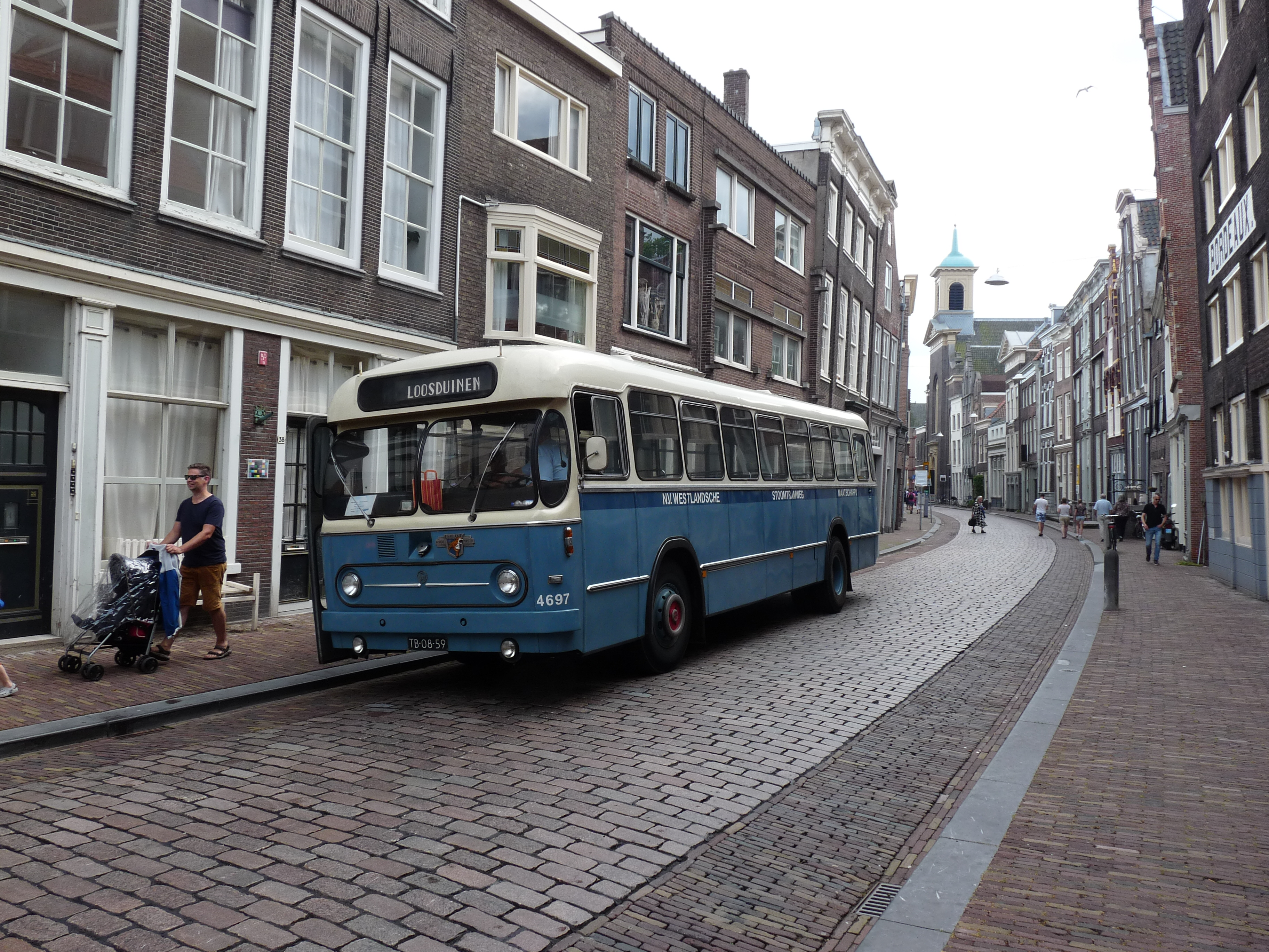 Veteraan bussen bij Dordt in Stoom mei 2018